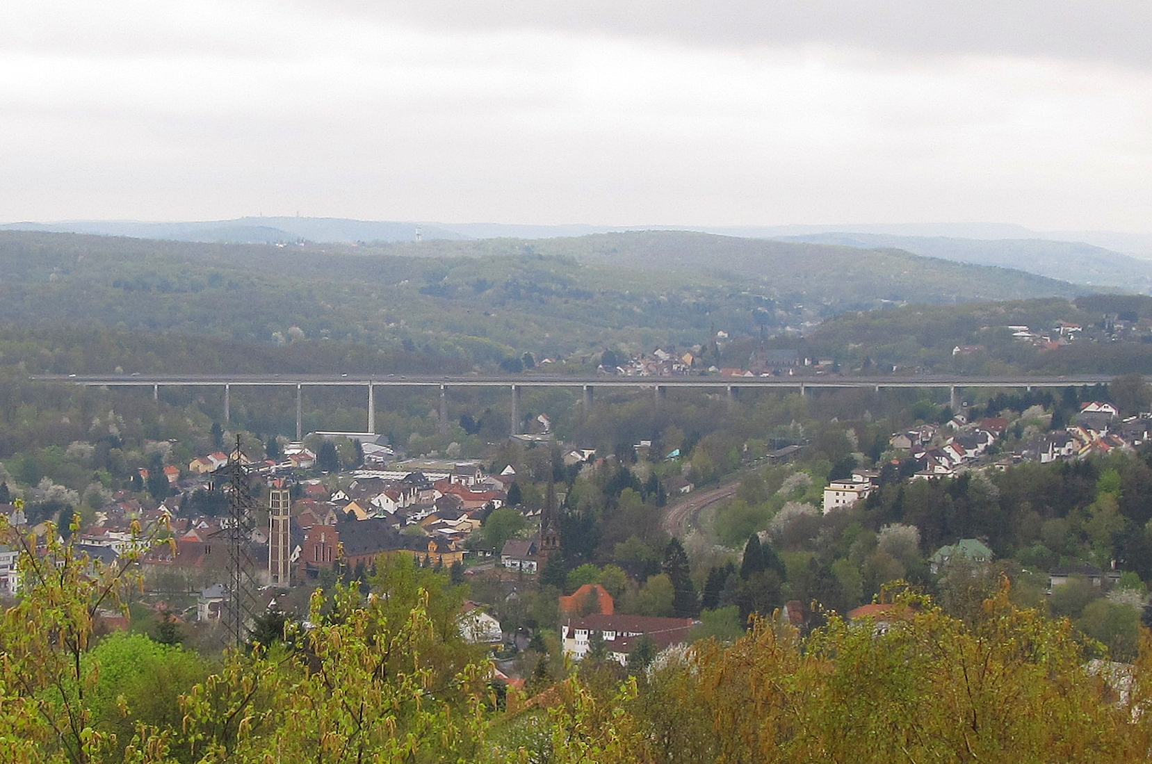 Sulzbachtalviadukt zwischen Sulzbach-Altenwald und Friedrichsthal, Regionalverband Saarbrücken, Saarland